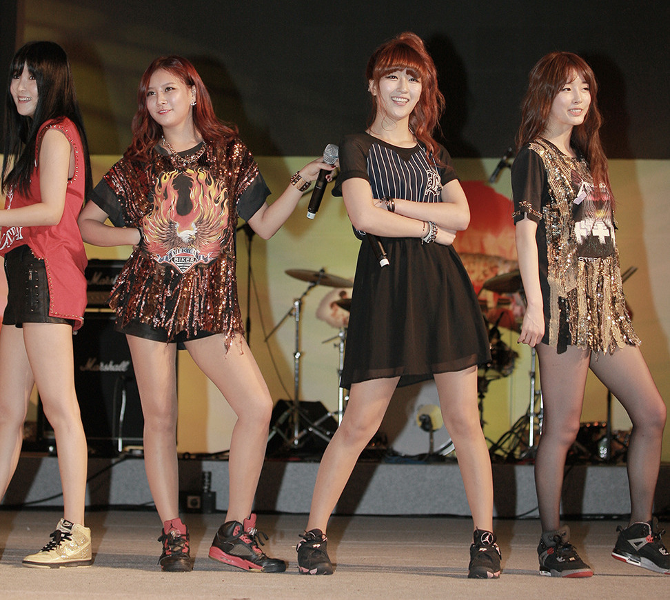 걸그룹 글램